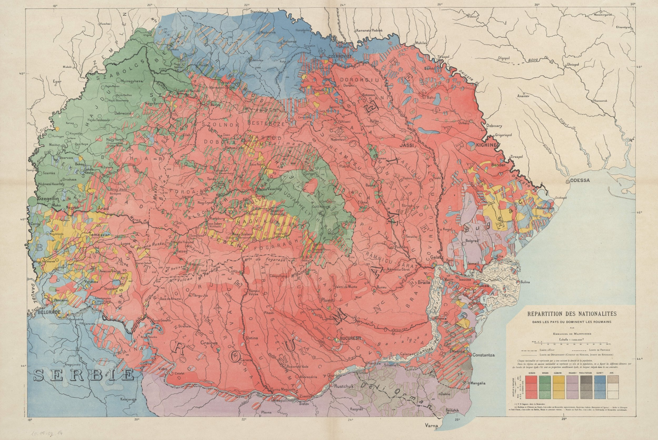 Repartiția naționalităților în țările unde predomină românii, hartă considerată una dintre cele mai influente lucrări cartografice din 1919, având un rol important în negocierile de pace de la Paris.